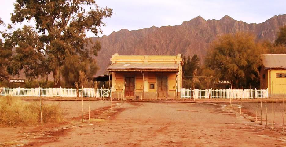 Antigua estación del FG Belgrano, Copacabana departamaneto de Tinigasta, Catamarca, Argentina